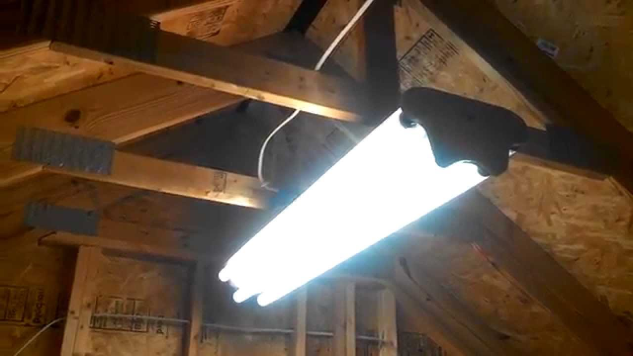 မြန်မာဘာသာ: ထွန်းလင်းနေသော မိးချောင်း